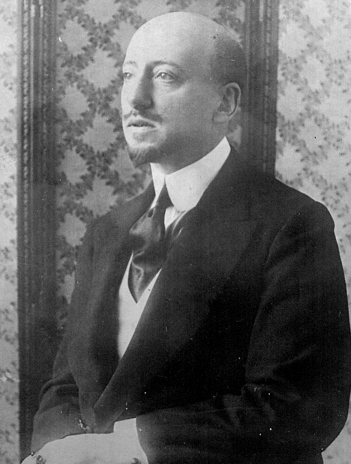 Gabriele d'Annunzio, Italienischer Dichter